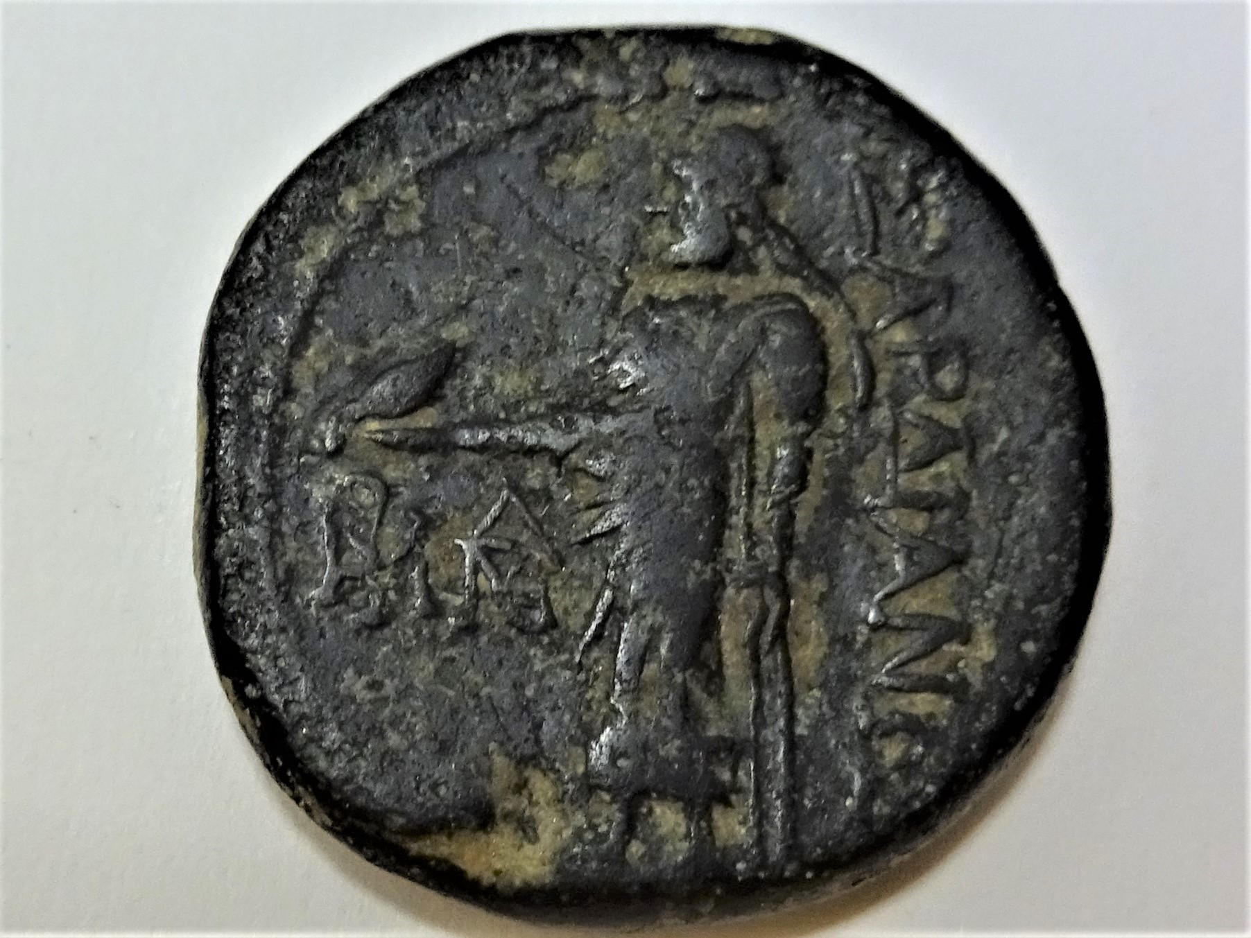 Zeus Lydios mit Adler und Zepter, 2. Jh. v. Chr., Szaivert/Sear Nr. 5171, 20 mm